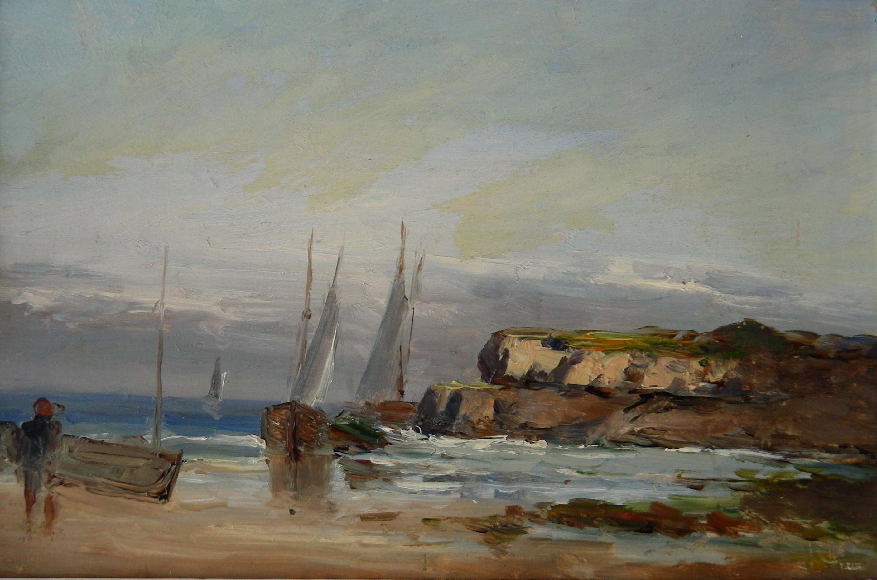 oleo de José Entrala